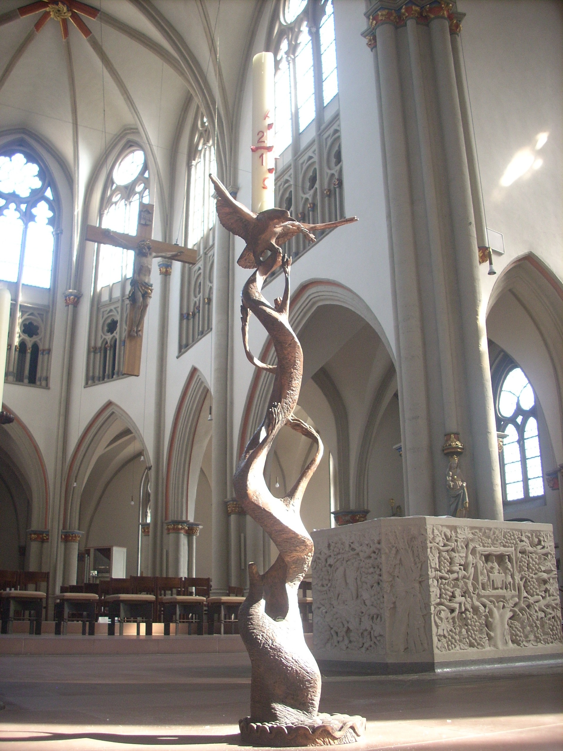 Braunschweig, kath. Kirche St. Aegidien, Osterleuchter (Sintflut, Taube mit Olivenzweig), Altar, Chor